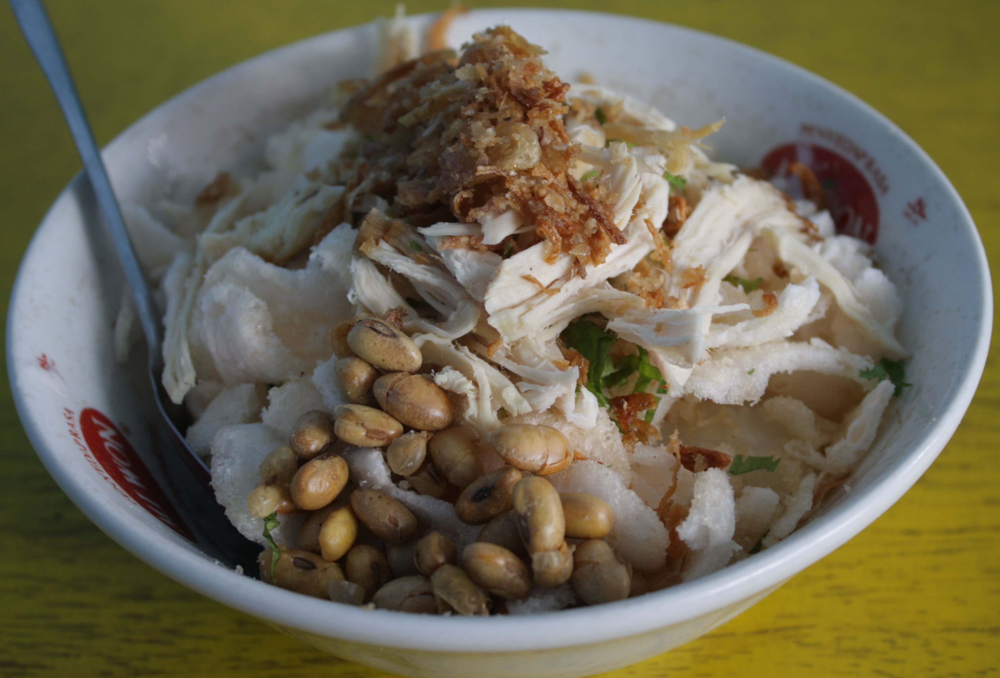 Bubur ayam adalah makanan yang bahan utamanya adalah beras dan dikombiasi kacang,krupuk dan daging ayam